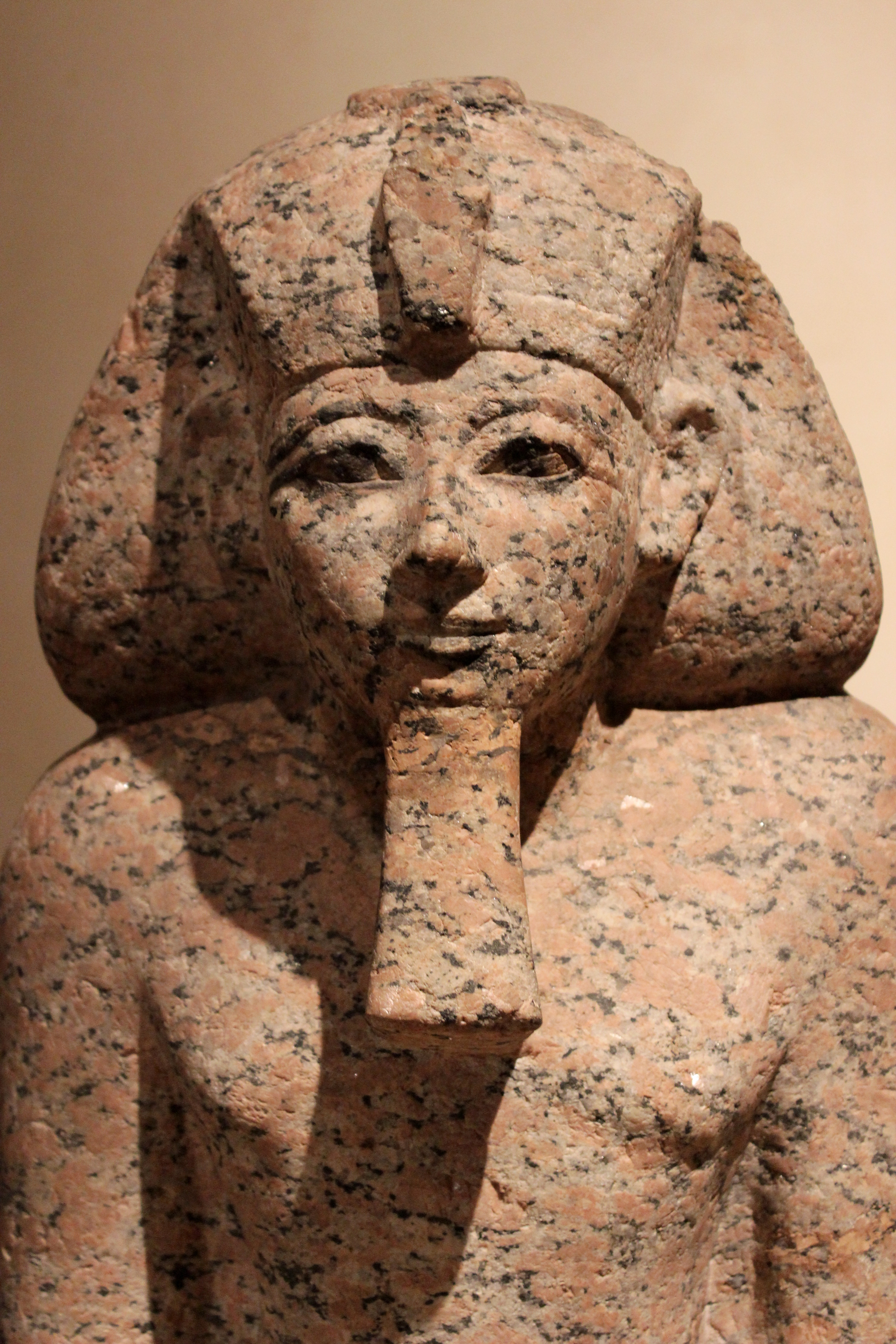 Berlín. Neues Museum. Hatsepsut.